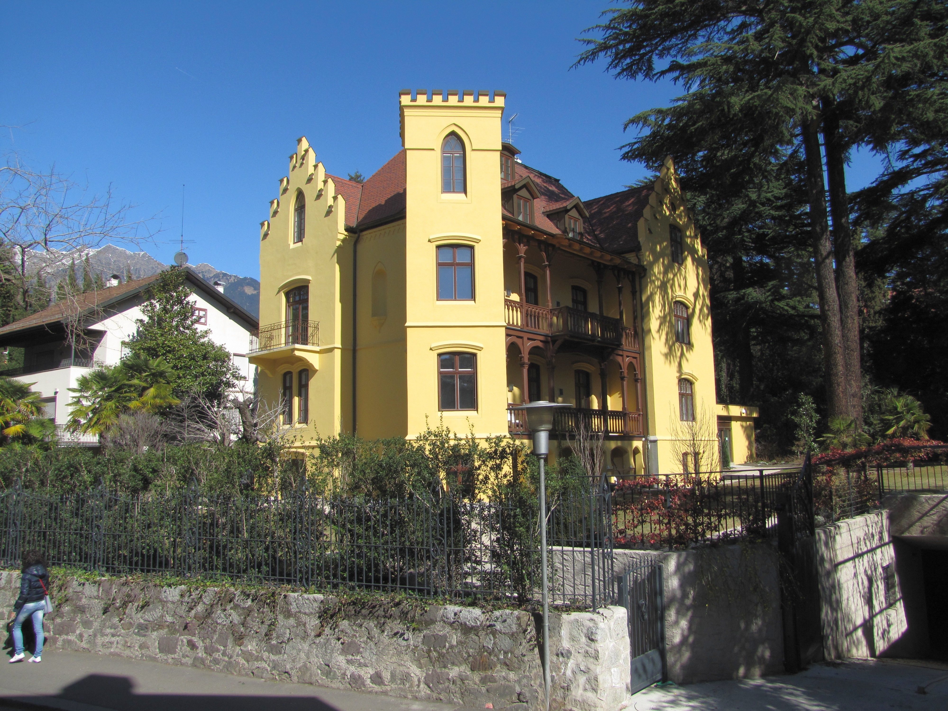 Villa Monte Maia in Meran